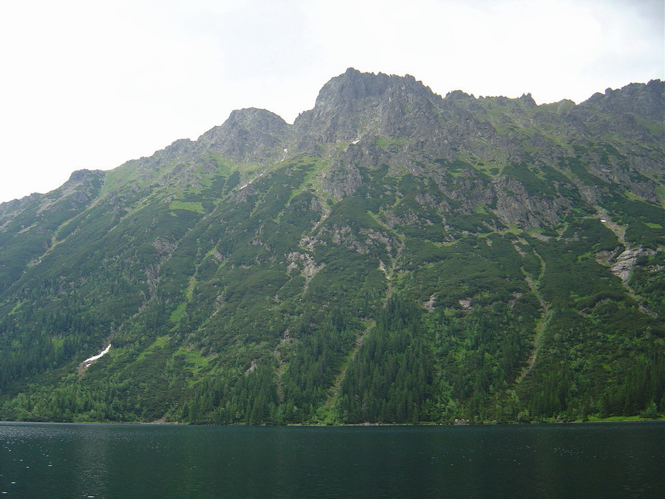 Nizny Zabi stit and Zabia kopa